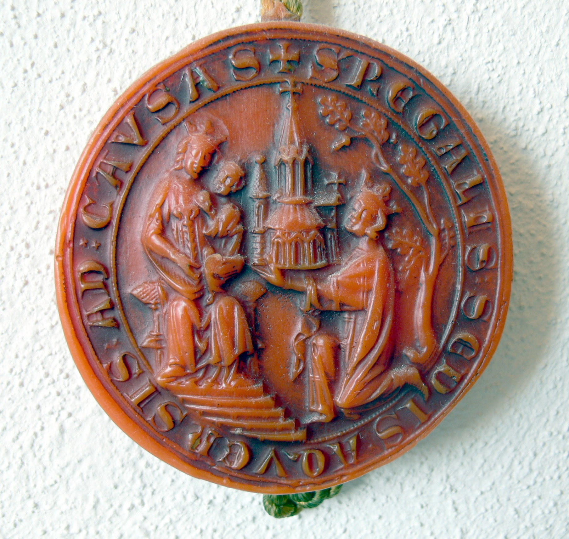 Kleines Stadtsiegel Aachens von 1327: Umschrift in lateinischer Sprache: „S. REGALIS SEDIS AQUENSIS AD CAUSAS“. Siegelbild: Karl der Große überreicht die Pfalzkapelle an die Jungfrau Maria